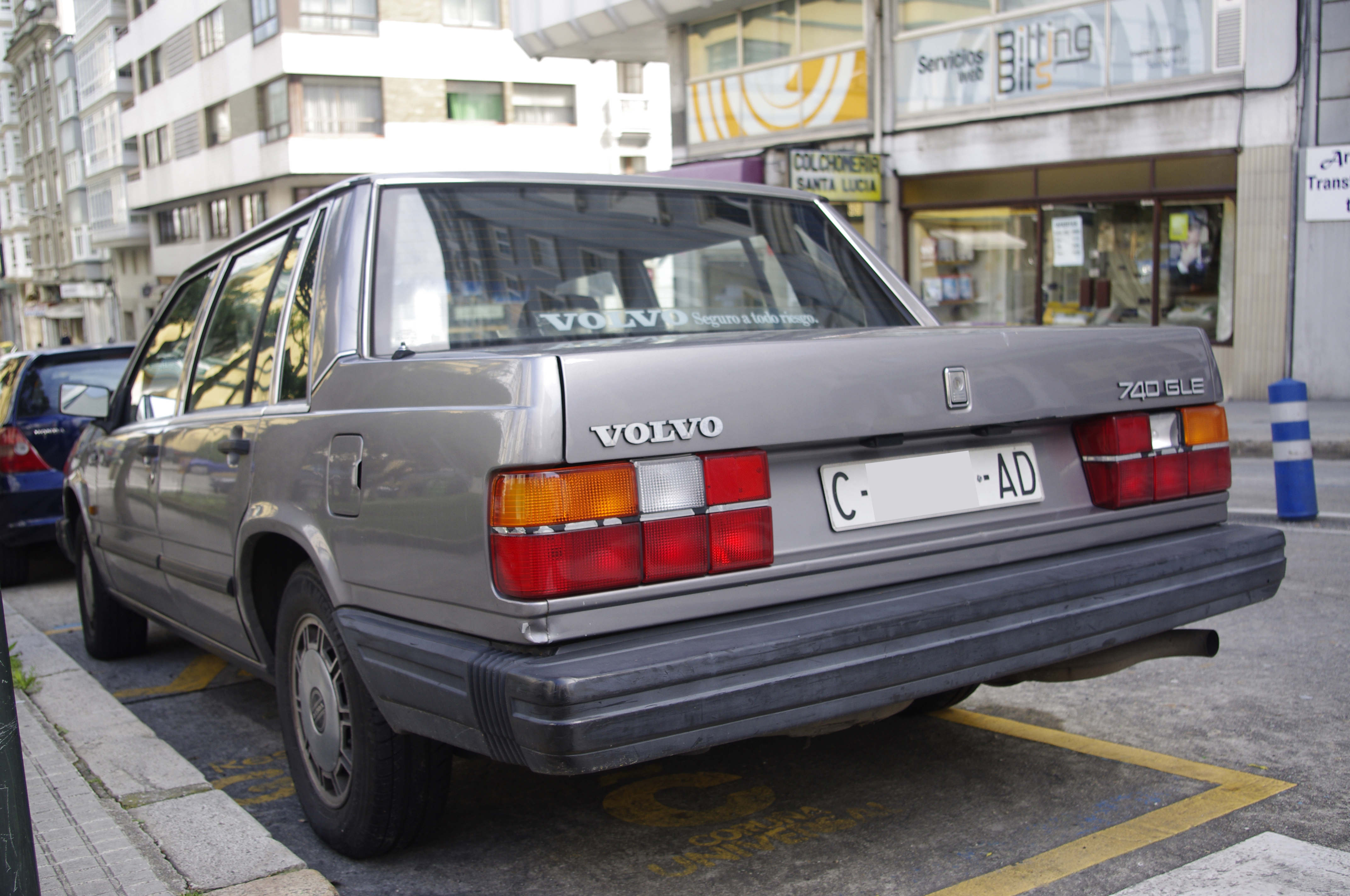 1986 Volvo 740 [744] GLE